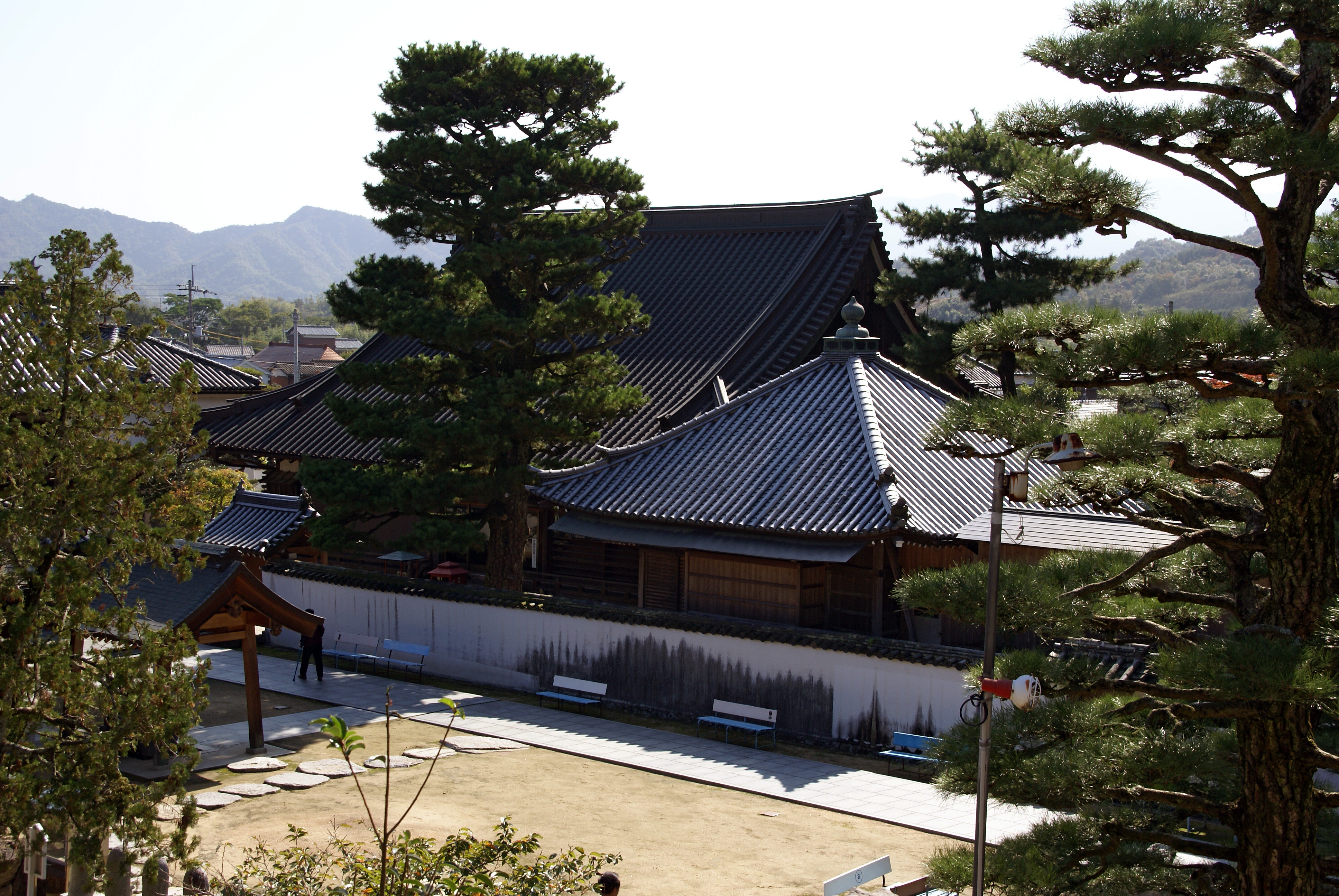 Yodaji in Higashikagawa, Kagawa prefecture, Japan